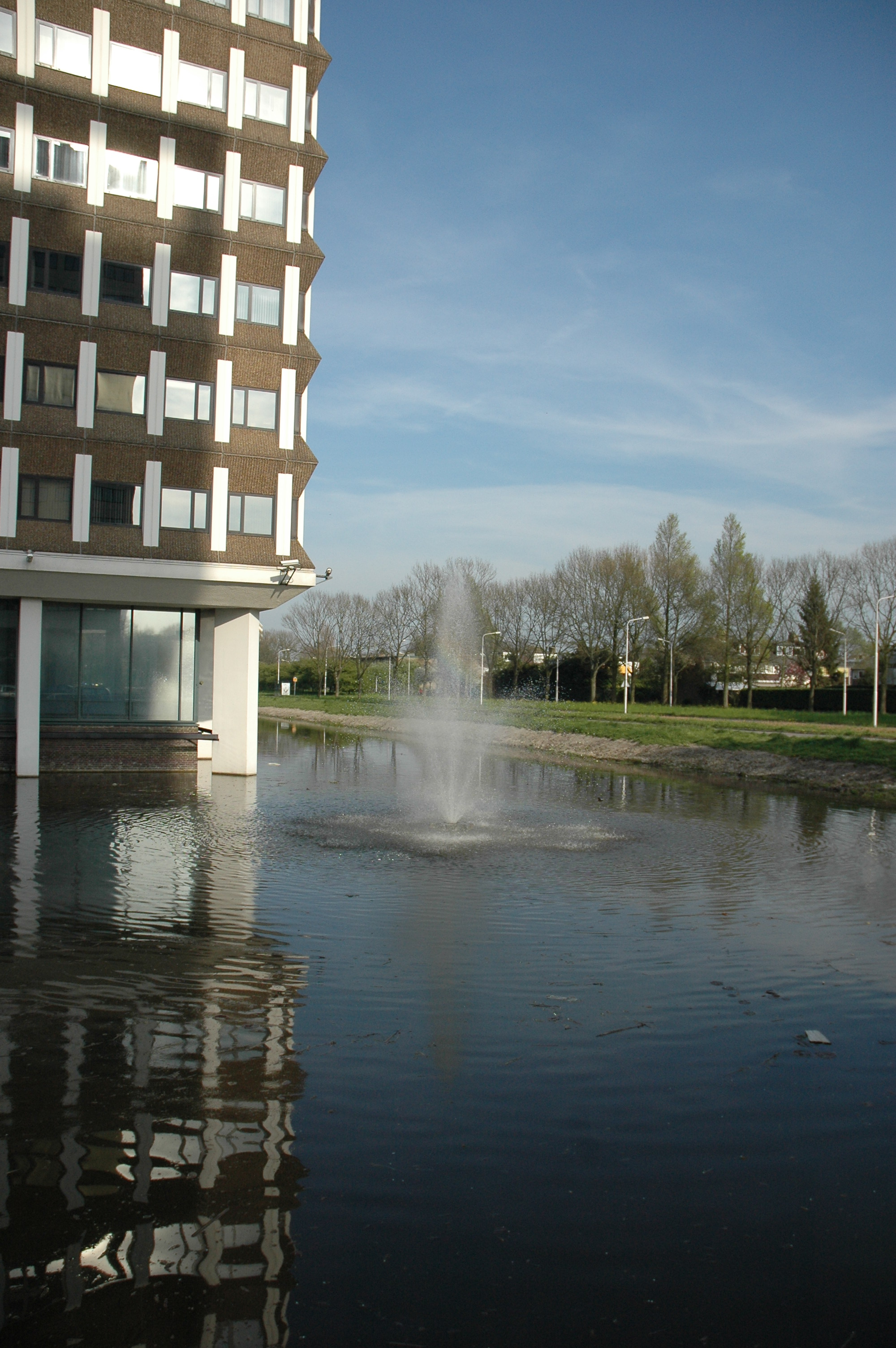 Kronenburg, Amstelveen, Netherlands